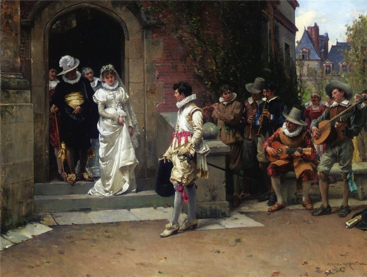 А.Моро. После свадьбы